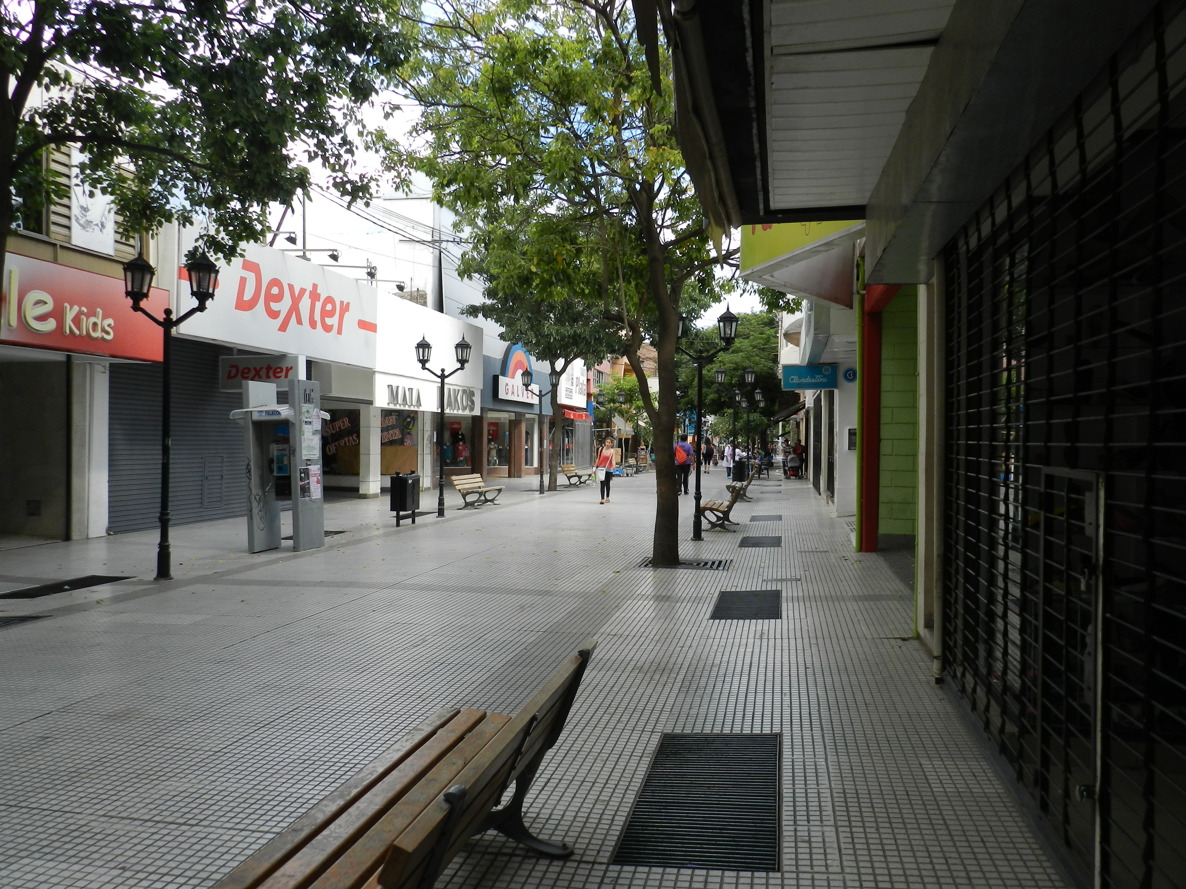 Peatonal Rivadavia, paseo peatonal de la ciudad de Catamarca.